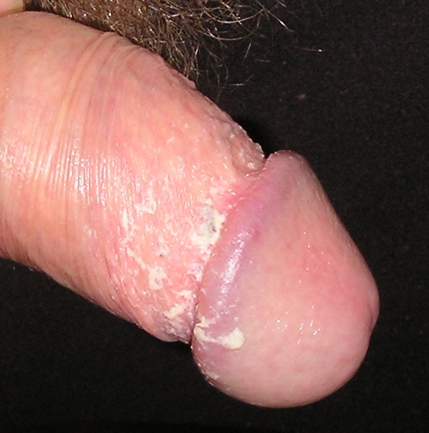 Smegma